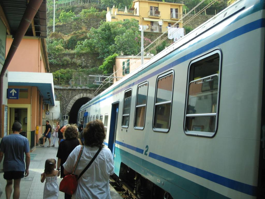 Stazione di Vernazza. Treno in sosta al primo binario